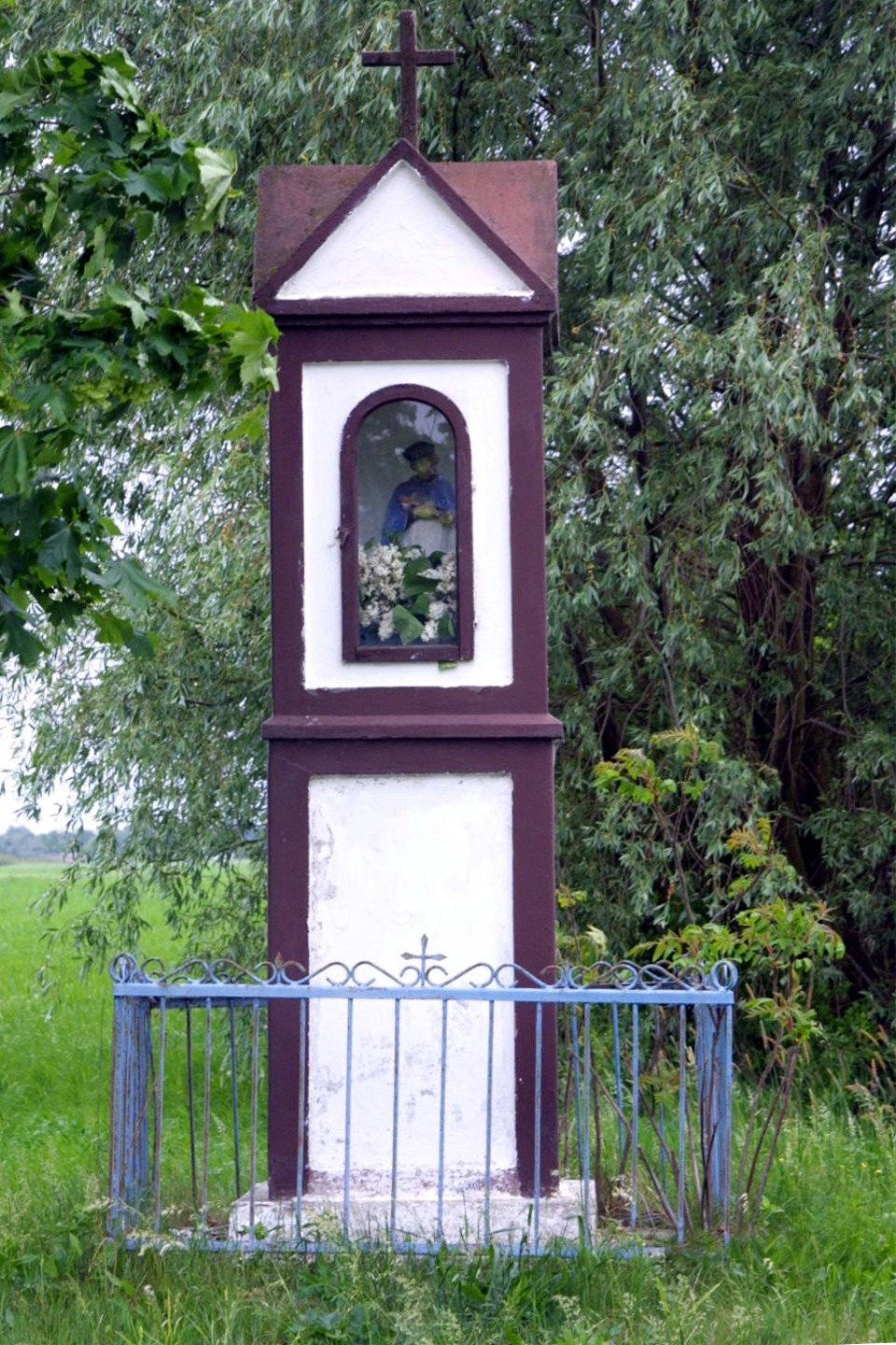 Górki Borze. Kapliczka z figurą św. Jana Nepomucena.